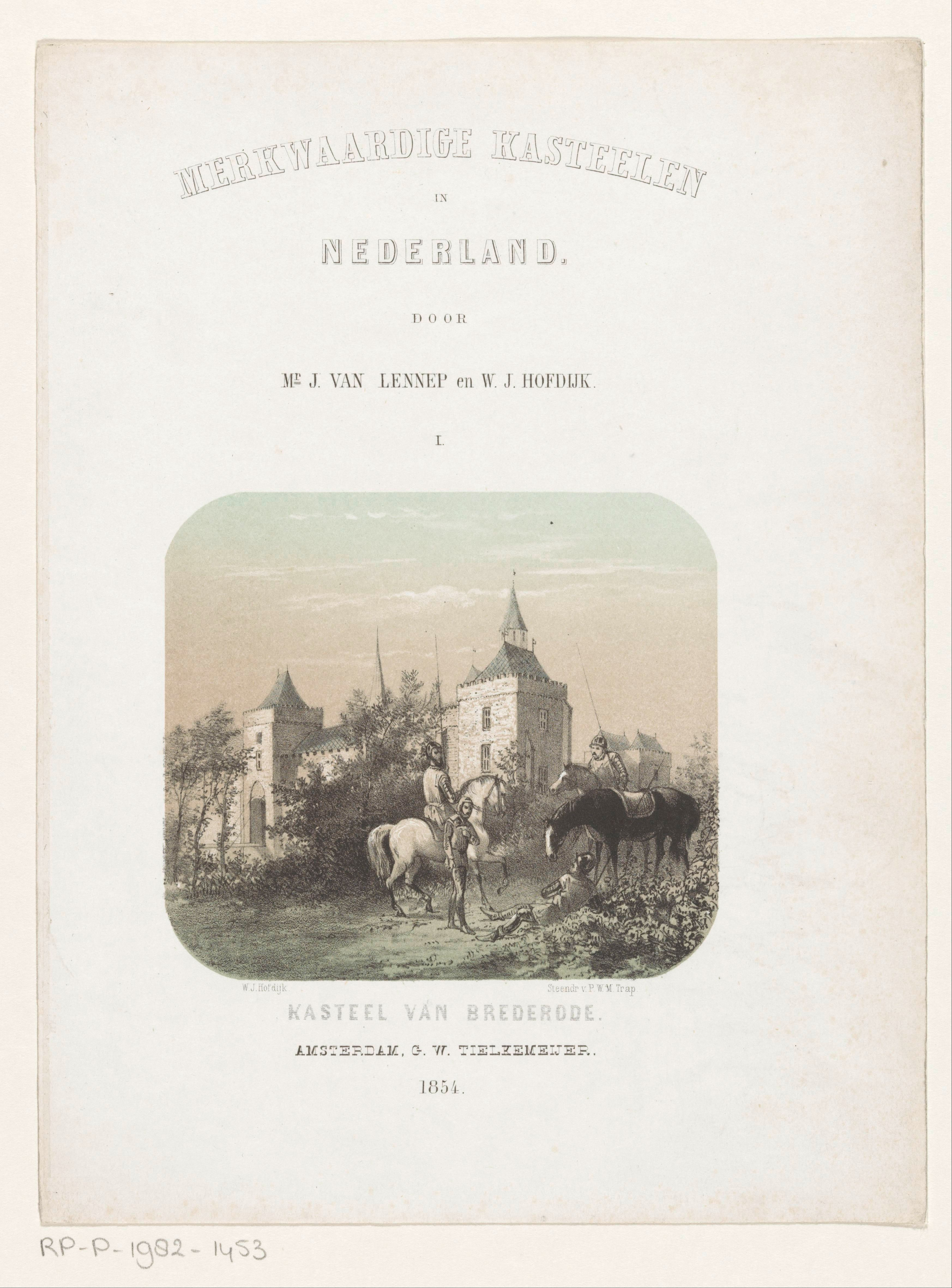 IdentificatieTitel(s): Kasteel van BrederodeTitelpagina voor: J. van Lennep en W.J. Hofdijk, MerkWaar: dige kasteelen in Nederland, 1854Objecttype: prent titelpagina Objectnummer: RP-P-1982-1453Opschriften / Merken: verzamelaarsmerk, verso, gestempeld: Lugt 2228verzamelaarsmerk, verso, gestempeld: Lugt 2760Omschrijving: Gezicht op het kasteel Brederode bij Santpoort-Zuid met een drietal rustende ruiters en hun paarden.VervaardigingVervaardiger: prentmaker: Willem Jacob Hofdijk (vermeld op object)drukker: Pieter Willem Marinus Trap (vermeld op object)uitgever: George Wilhelm Tielkemeijer (vermeld op object)Plaats vervaardiging: AmsterdamDatering: 1854Fysieke kenmerken: kleurenlithografieMateriaal: papier Techniek: kleurenlithografie (procedé)Afmetingen: blad: h 242 mm × b 182 mmToelichtingTitelpagina voor: van Lennep J. en Hofdijk W.J. Merkwaardige kasteelen in Nederland. Amsterdam: Tielkemeijer, George Wilhelm, 1854.OnderwerpWat: castleriding a horse, ass, or mule; rider, horsemanWaarSantpoort-ZuidVerwerving en rechtenVerwerving: aankoop 1982Copyright: Publiek domein